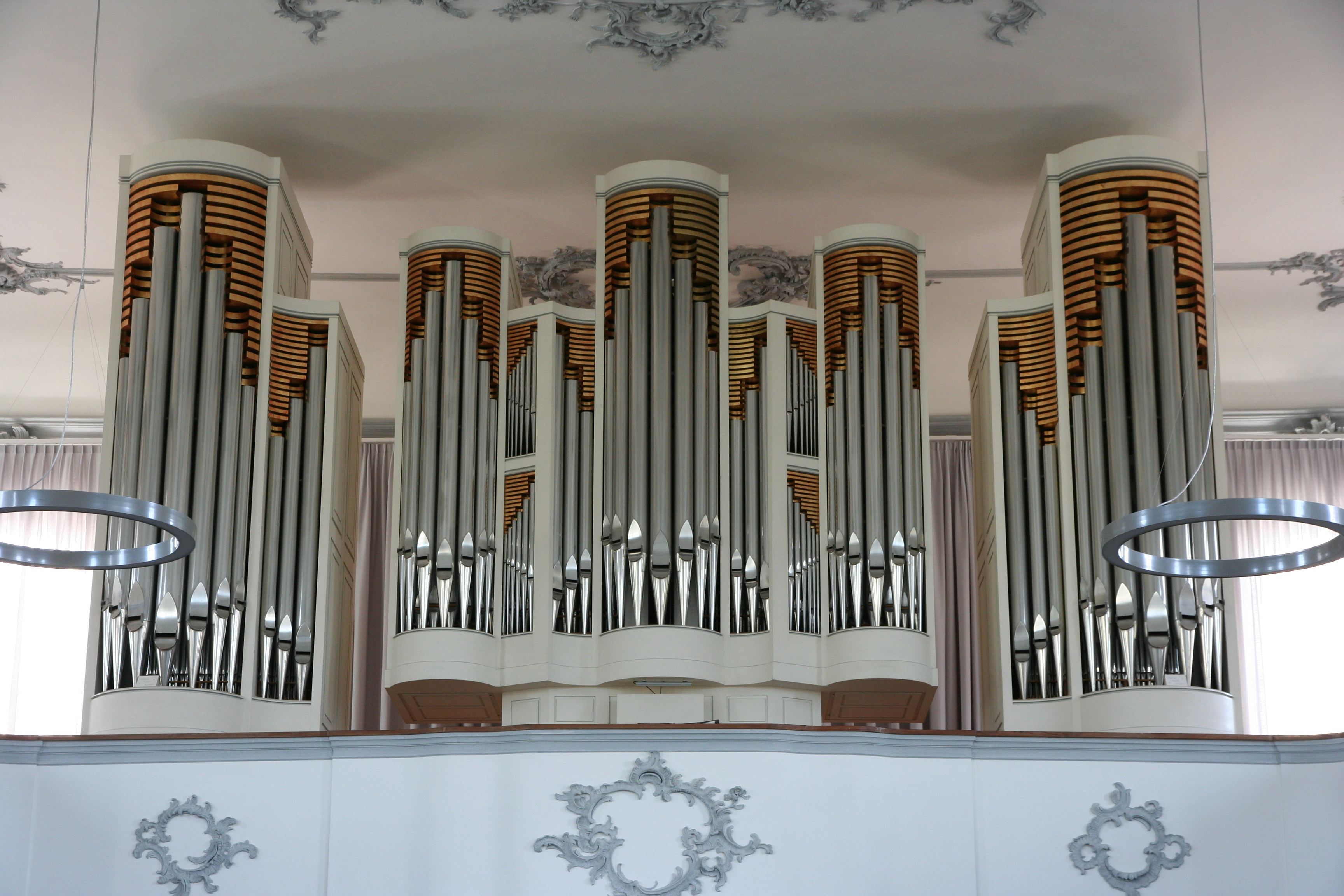 Kuhn-Orgel (1970) der Evangelisch-reformierten Kirche Steckborn TG